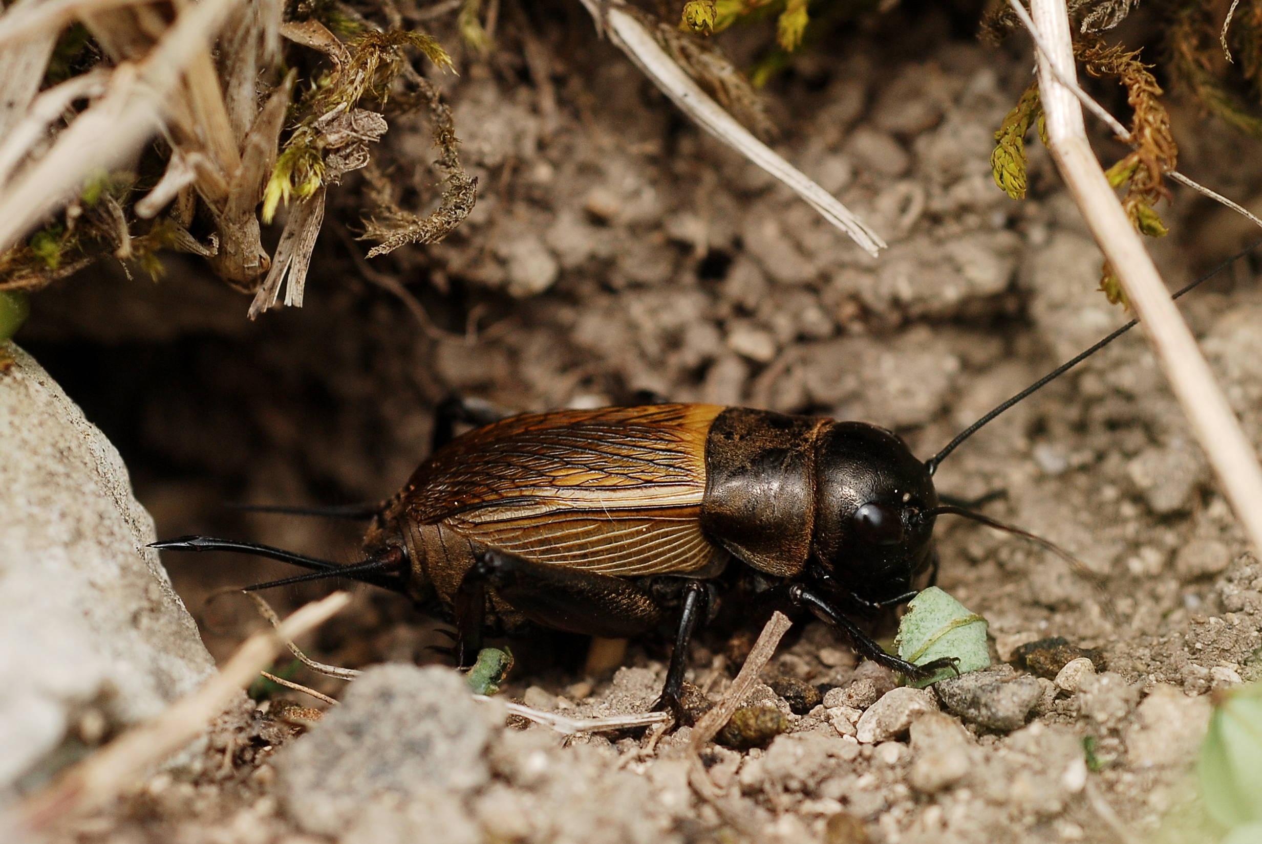 Gryllus campestris female